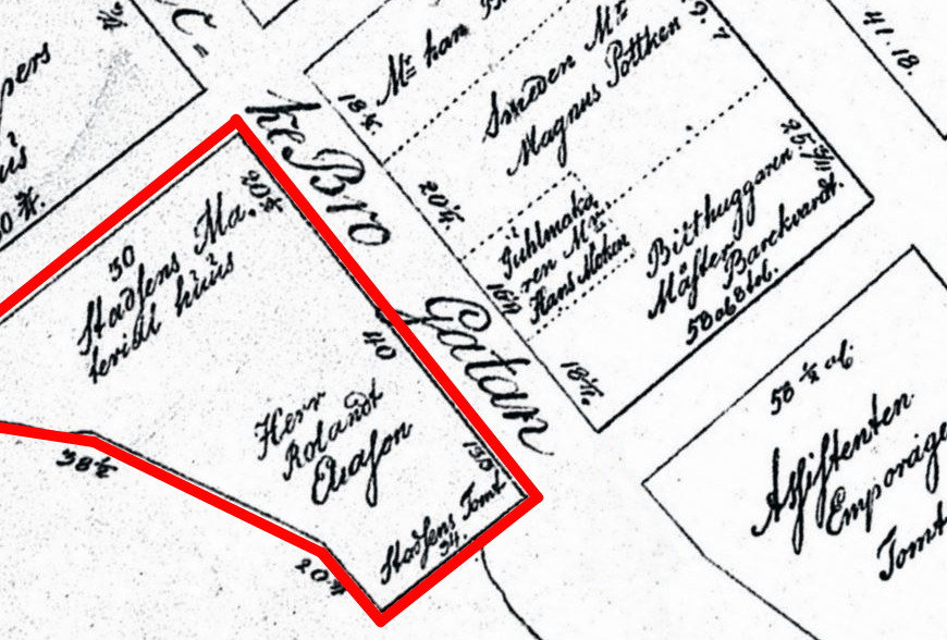 Stadsplanering sydvästra Stadsholmen med kvarteren Icarus och Daedalus och tomtägare omkring 1700